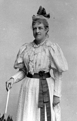 Maria Dehli, norsk kvinnesakskvinne.